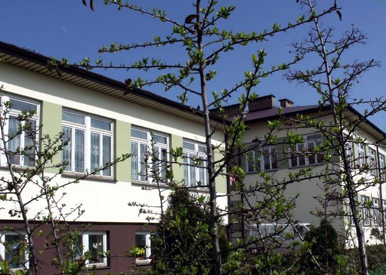 Aktualny wygląd szkoły - front budynku.